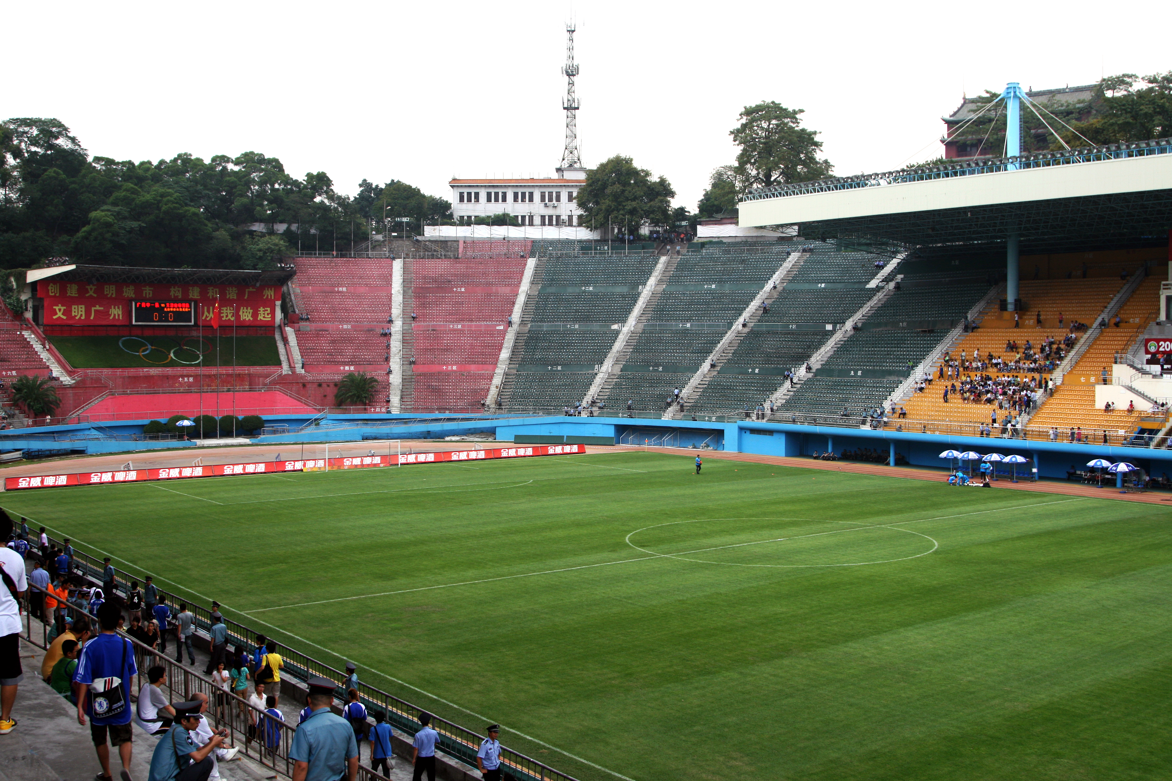 越秀山体育场一隅